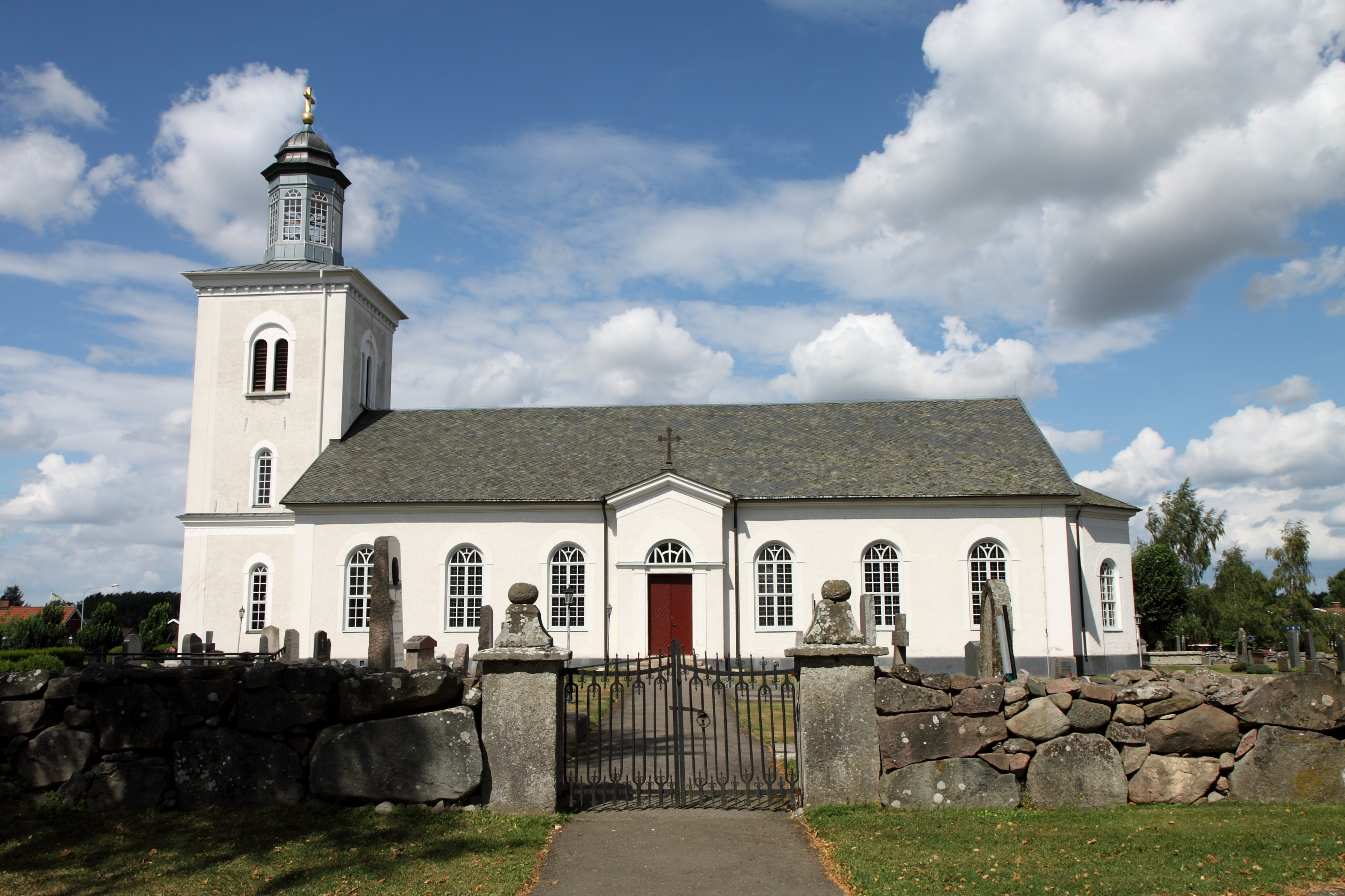 Värsås kyrka.